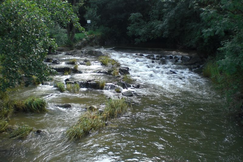 Wehr mit Fischtreppe